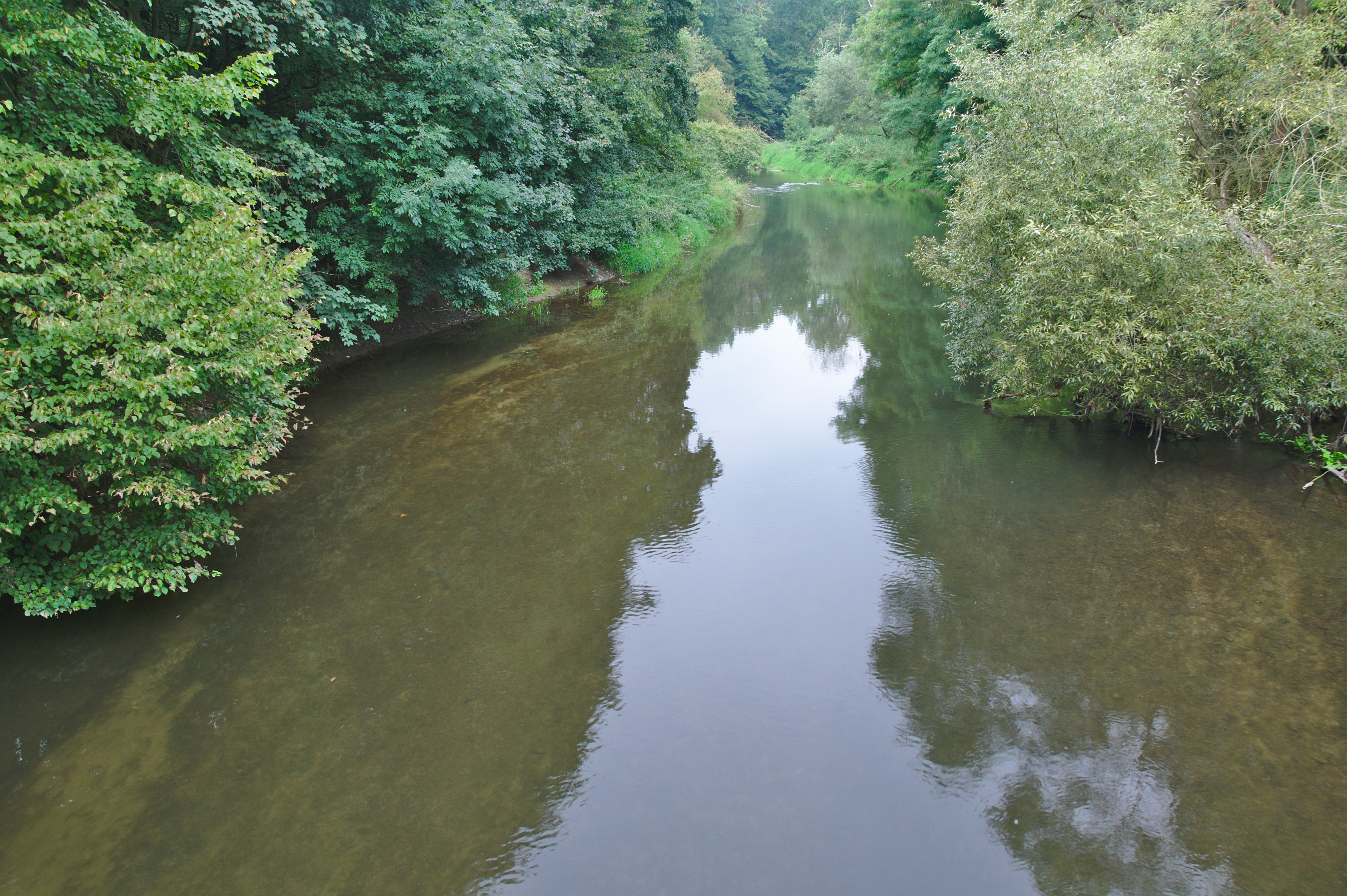 Morava na rozhraní národní přírodní rezervace Ramena řeky Moravy a přírodní rezervace Kenický, Střeň, okres Olomouc